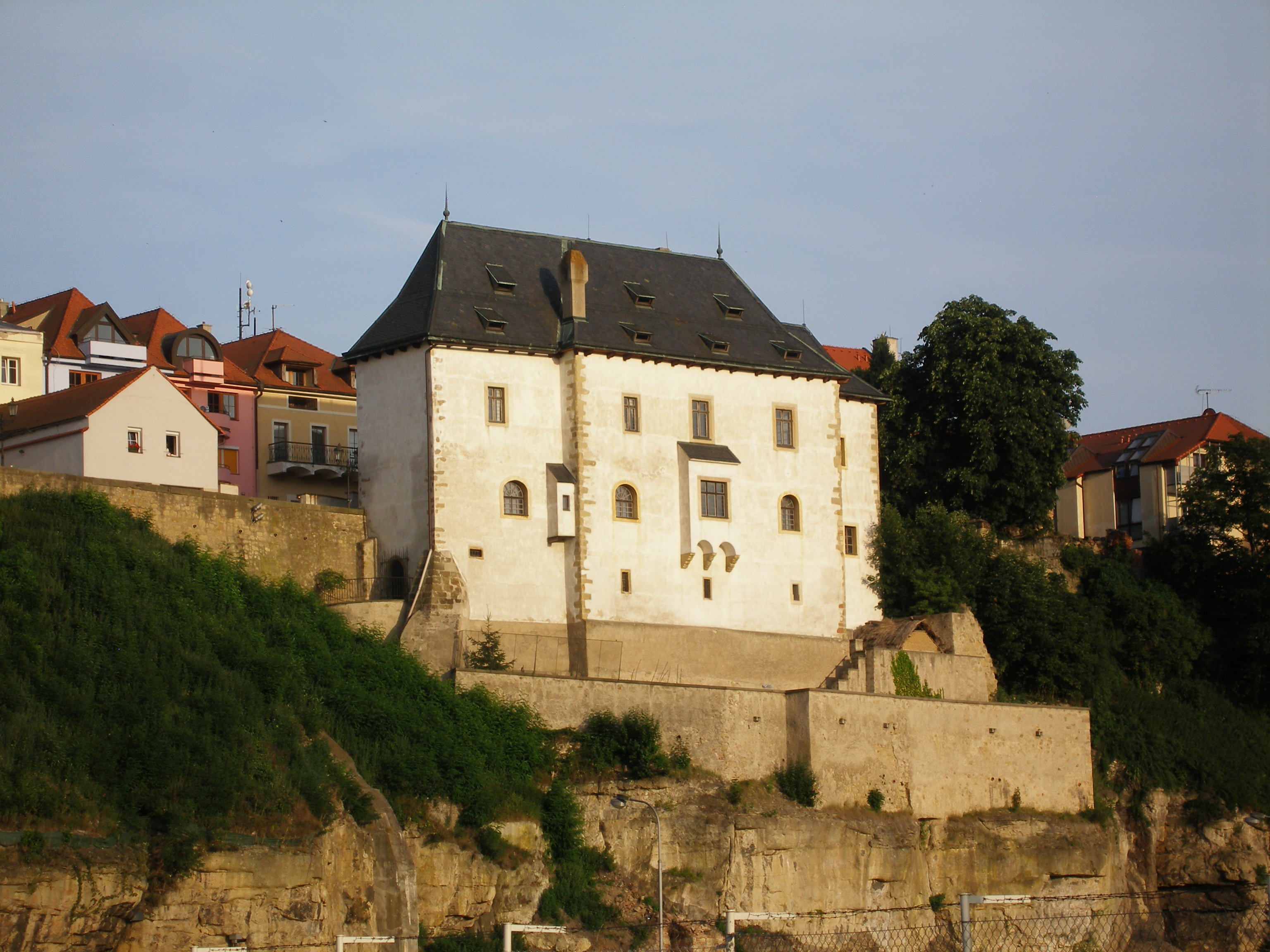 Objekt Templu v Mladé Boleslavi.